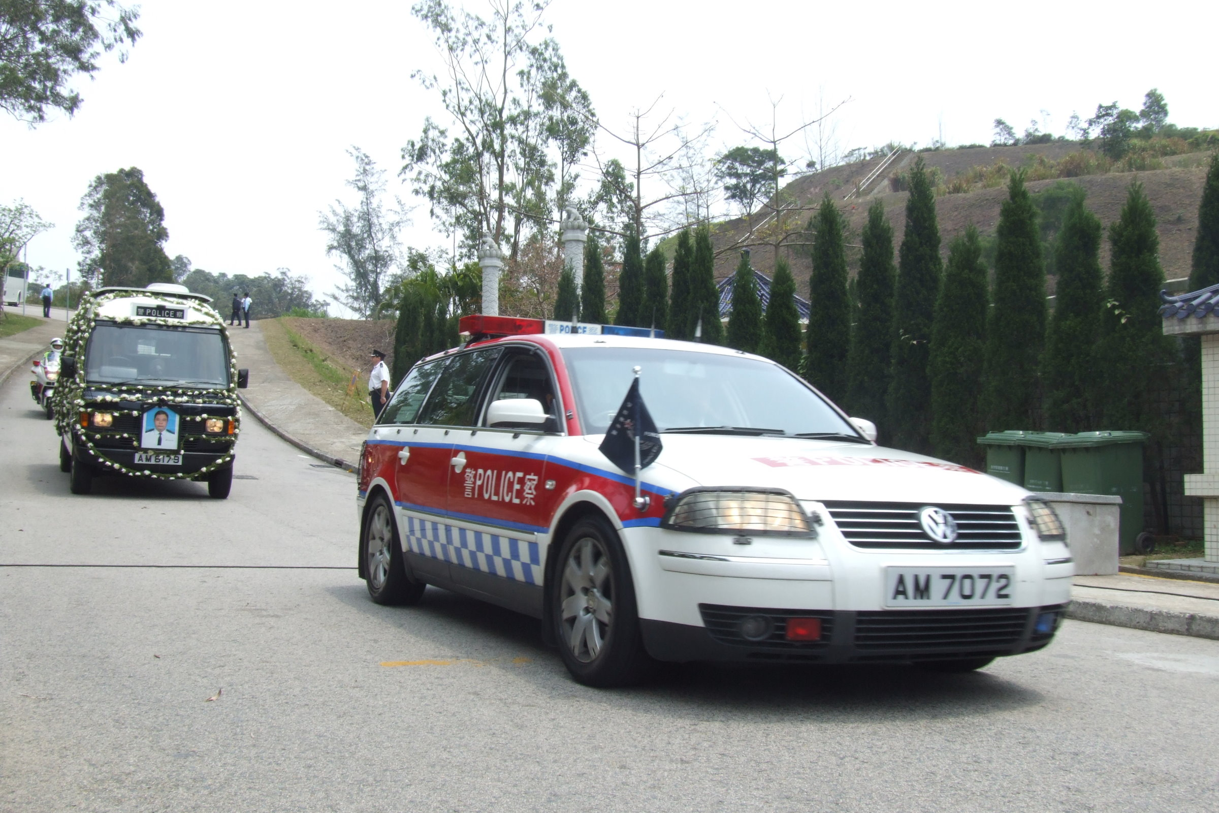 中文（香港）: 靈車到達浩園外。